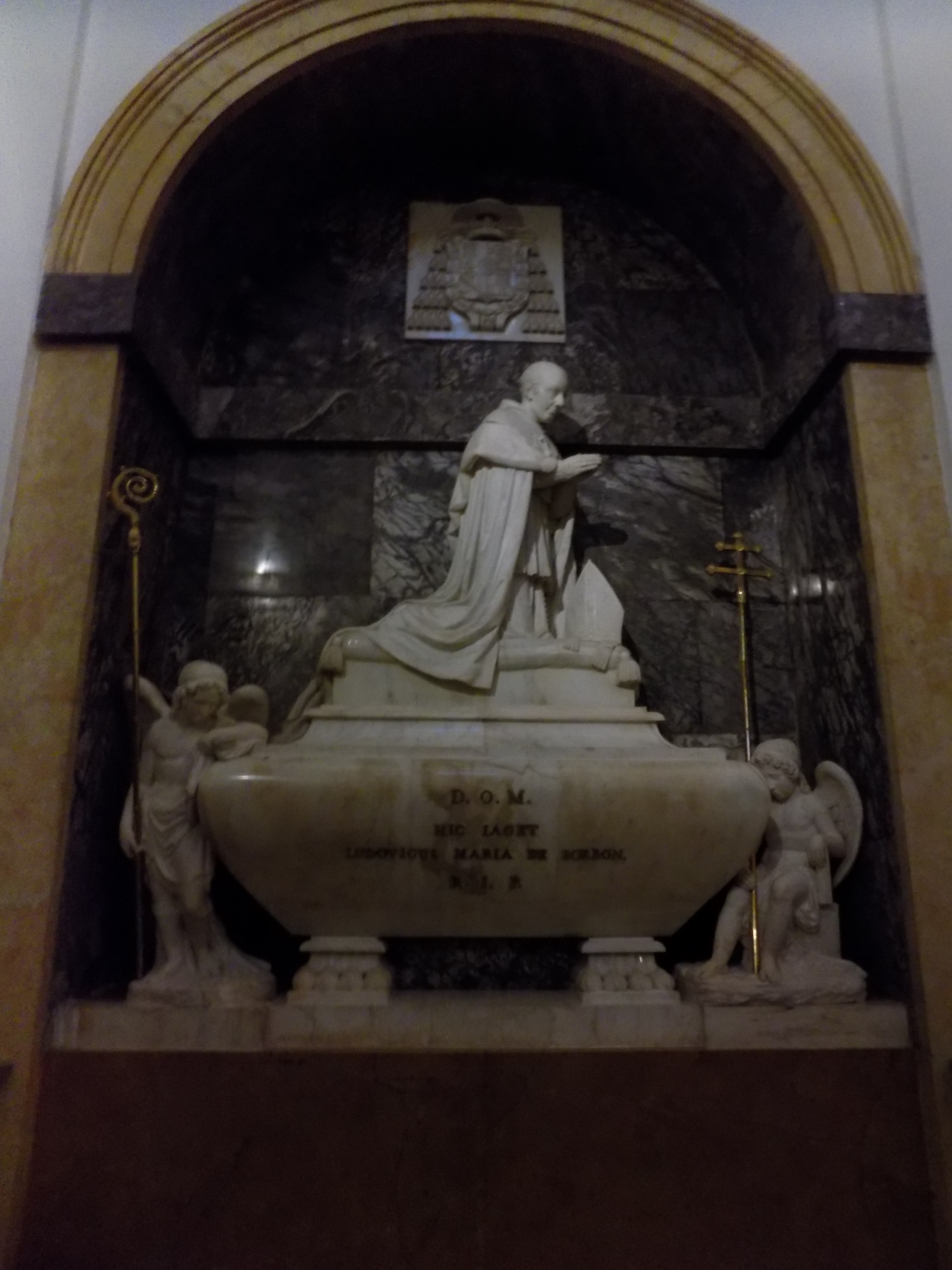 Sepulcro del cardenal Luis María de Borbón y Vallabriga (1777-1823), que fue arzobispo de Toledo y nieto del rey Felipe V de España, en la sacristía de la catedral de Toledo, (España).